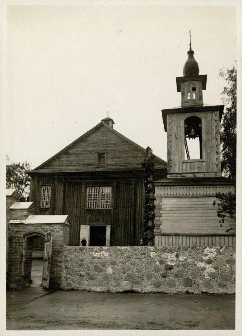 Беларуская (тарашкевіца): Граўжышкі. Касьцёл.